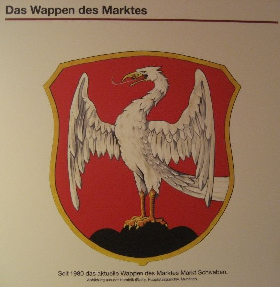 Wappen von Markt Schwaben. Abbildung aus dem Hauptstaatsarchiv München. Mit freundlicher Genehmigung des Heimatmuseums Markt Schwaben.